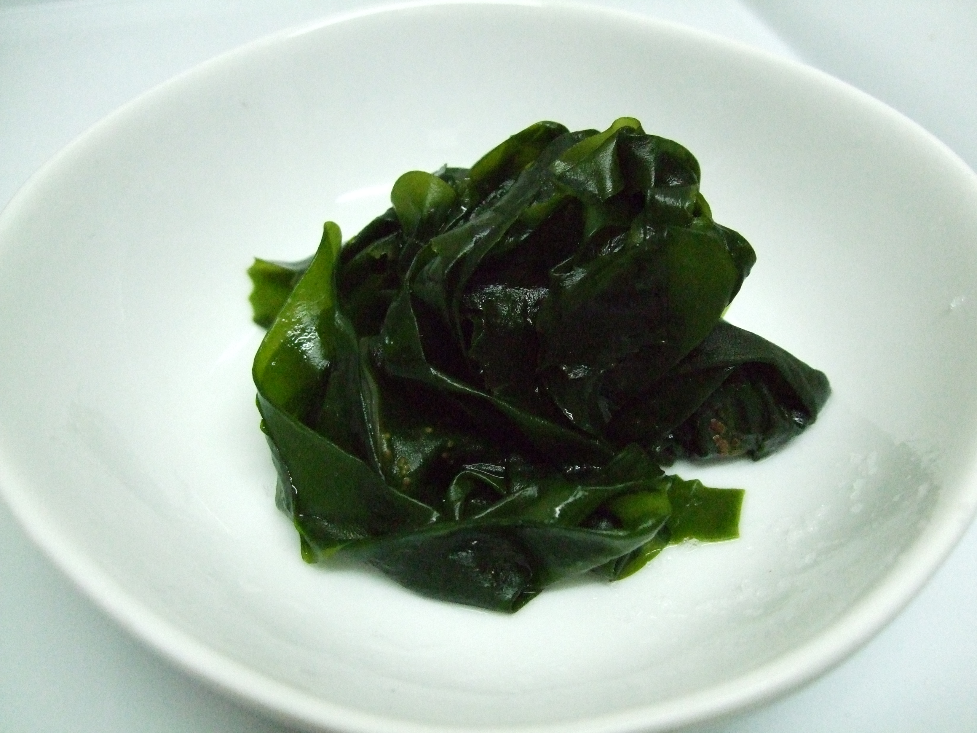 boiled Wakame 茹でたワカメ